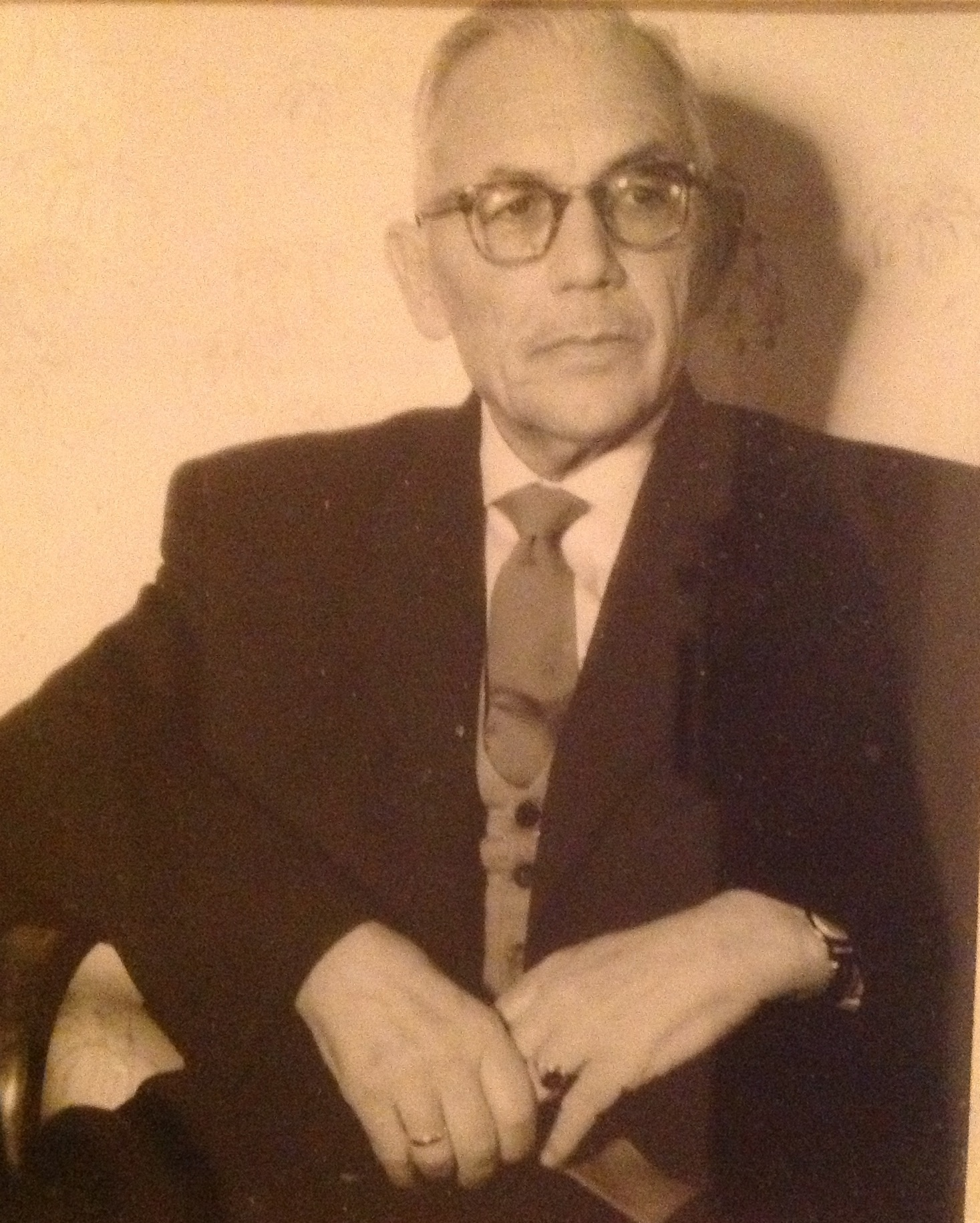 Deutscher Baumeiste Fritz Flöge r